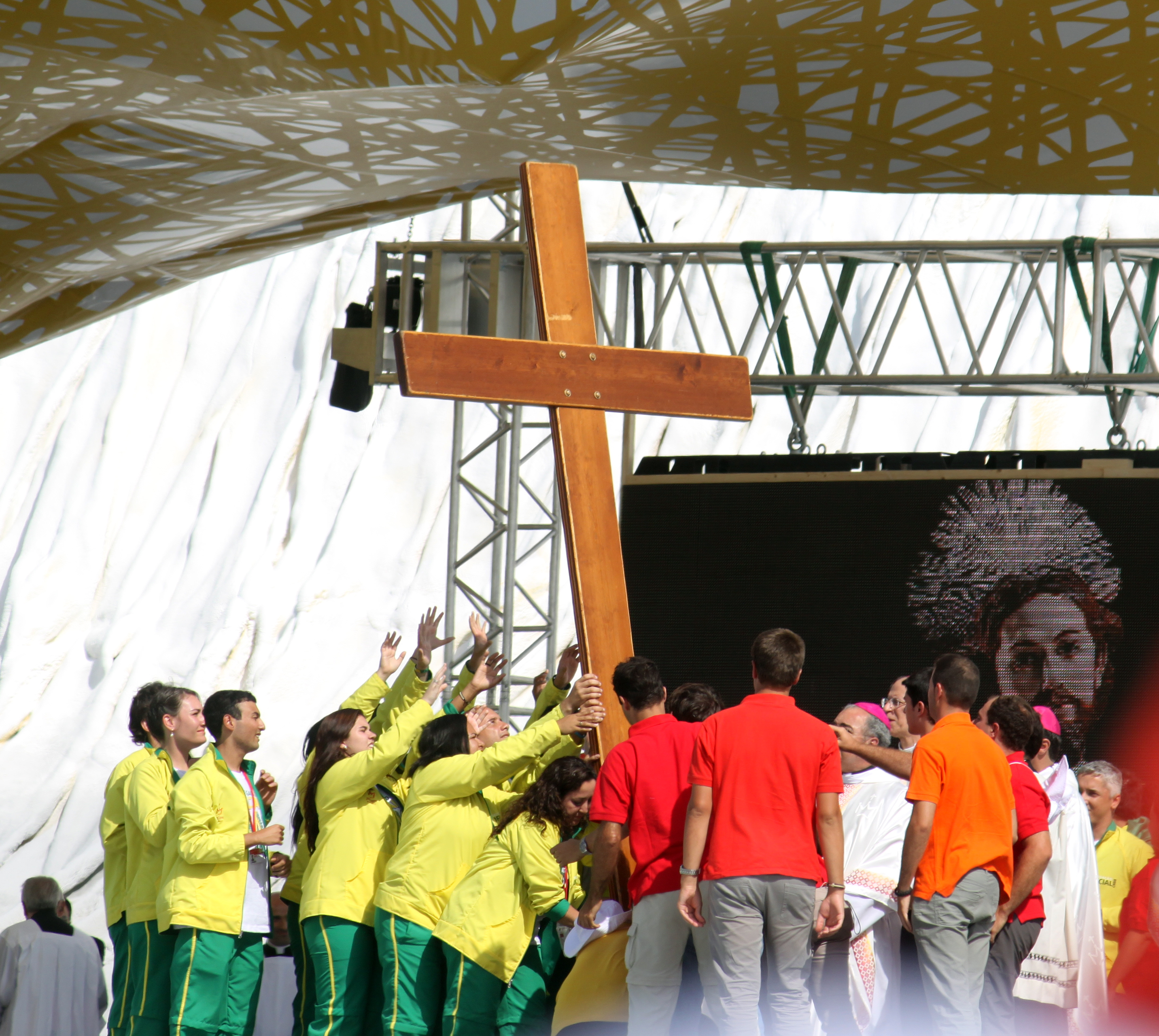 Cruz de los jóvenes.